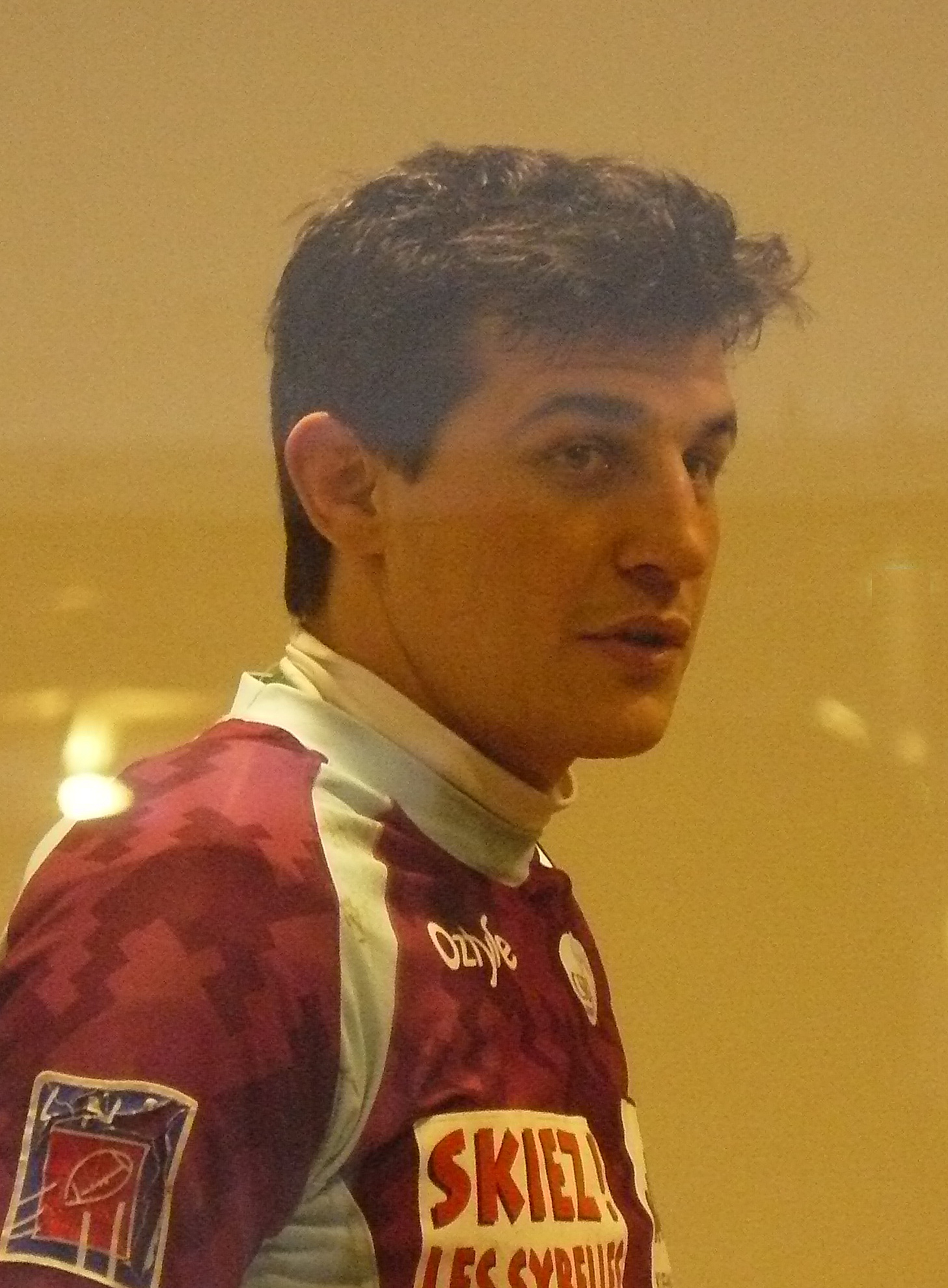 Benjamin Boyet, demi d'ouverture au CS Bourgoin-Jallieu, lors du match contre le Racing Métro 92 à Colombes, le 3 janvier 2010.